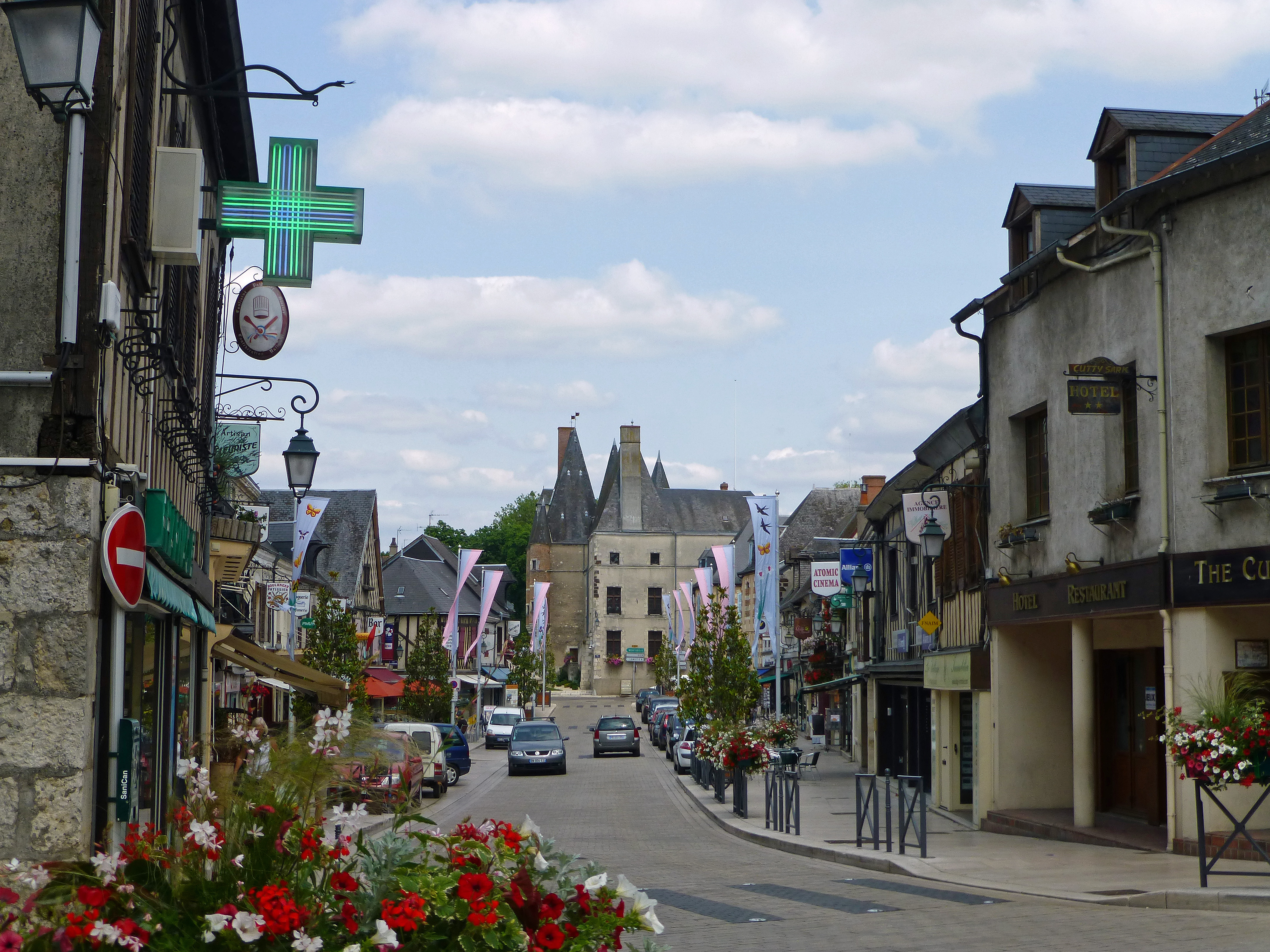 Aubigny-sur-Nère pavoisée (Cher)